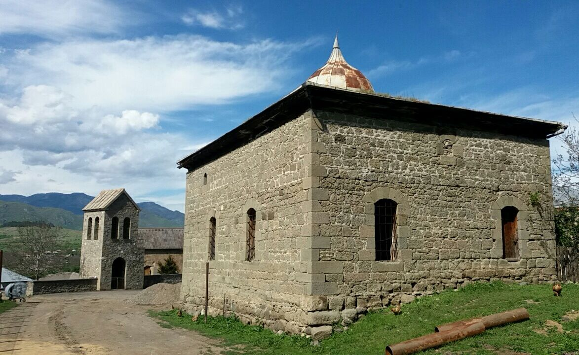 საყუნეთის მეჩეთი